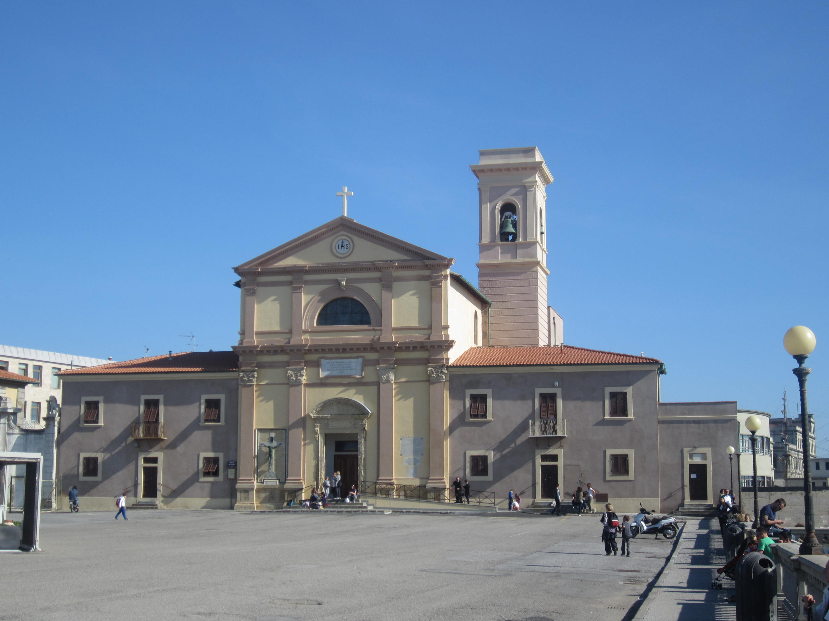 Chiesa di San Jacopo in Acquaviva, Livorno